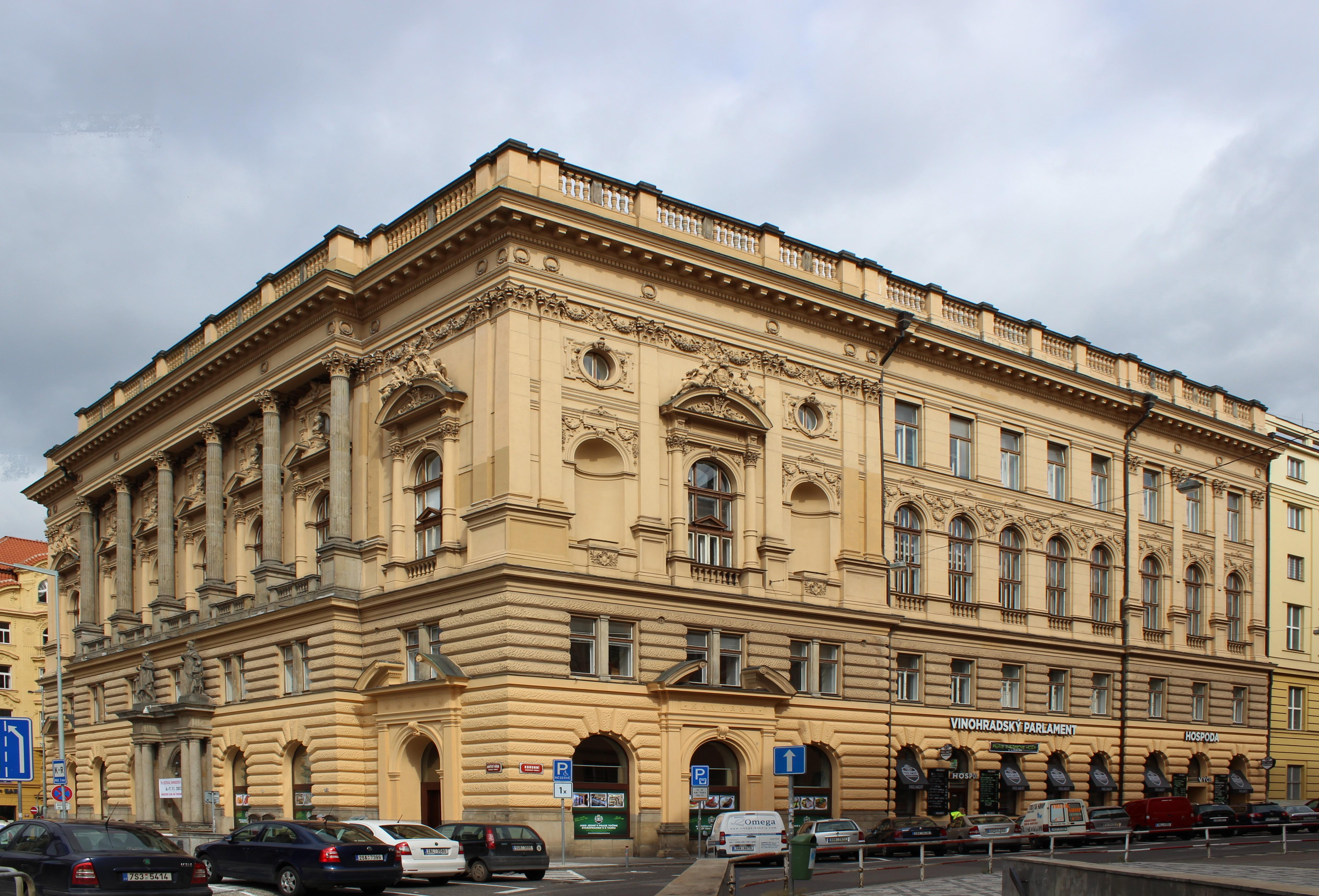 Kulturní dům na Vinohradech na pražském tamním náměstí Míru.